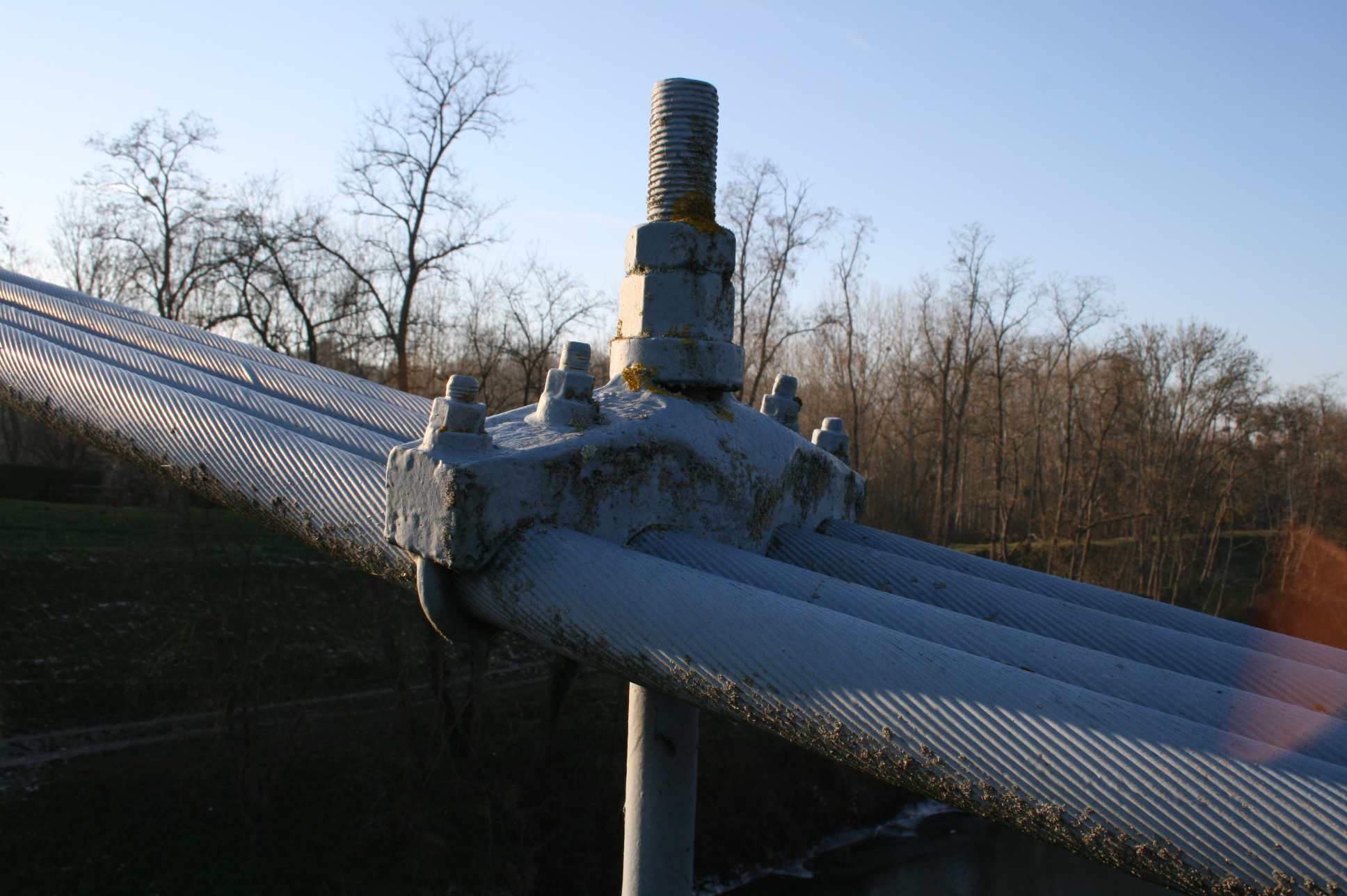 Pont de Châtillon-sur-Loire (Loiret - France) - Pont suspendu franchissant la Loire - Vue détaillée d'un chevalet de suspension raccordant la suspente au câble porteur.